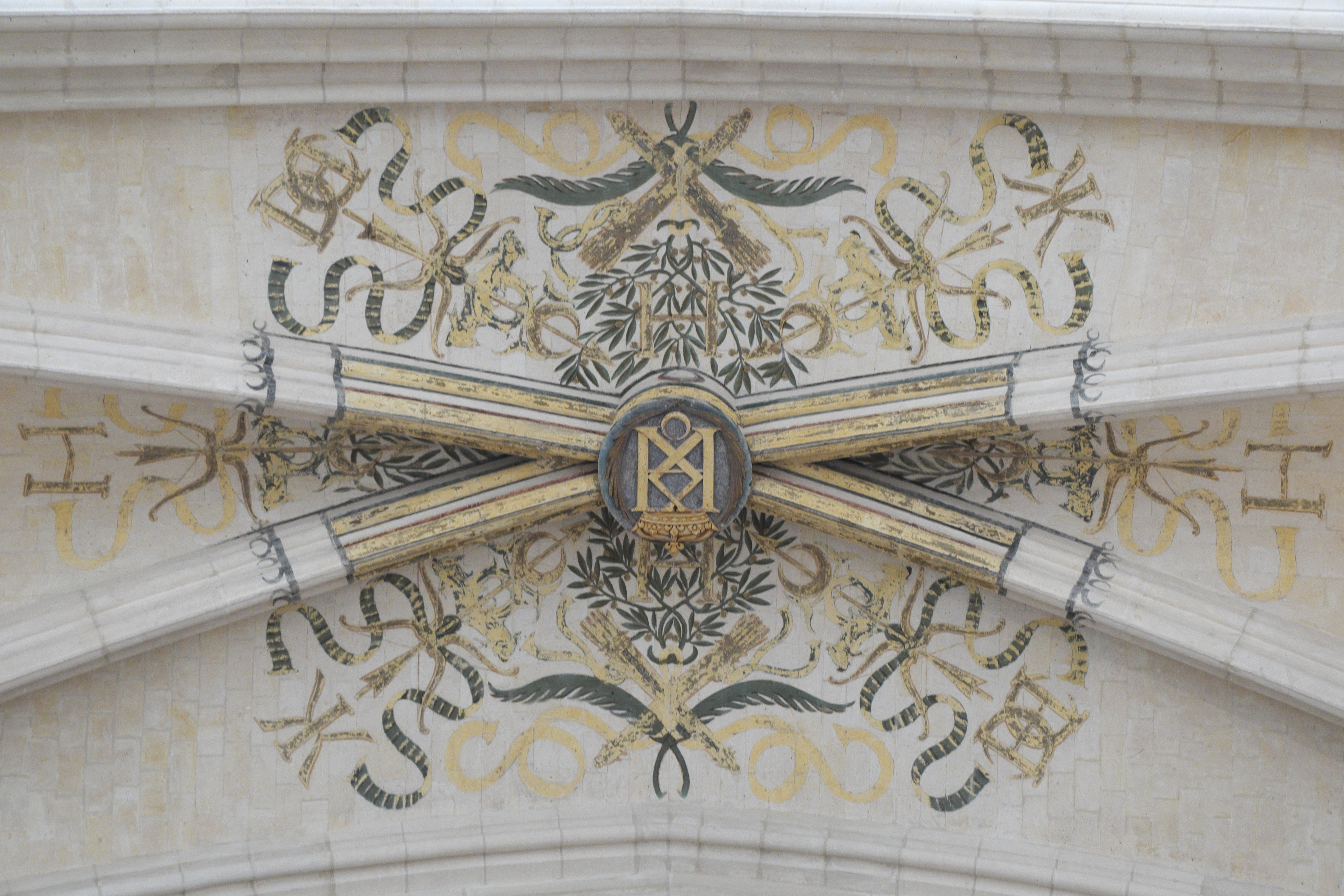 Gewölbeschlussstein und Deckenmalerei in der Sainte-Chapelle, der Palastkapelle des Schlosses von Vincennes im Département Val-de-Marne (Region Île-de-France/Frankreich), Darstellung: Halbmonde, H (Monogramm von Heinrich II.), Monogramm von Katharina von Medici, Monogramm von Karl IX.